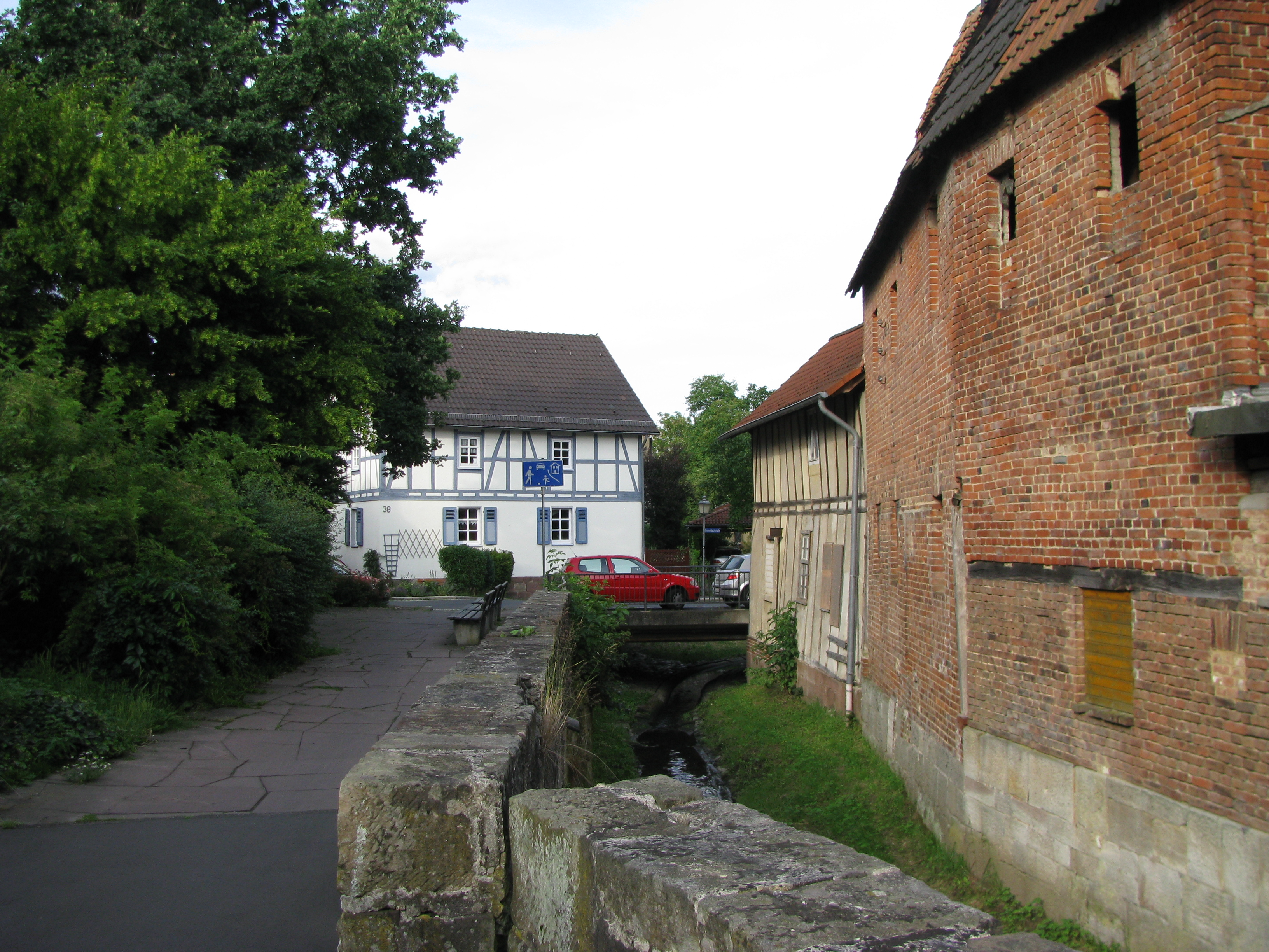 der Grunnelbach fließt an der alten Wagnerei entlang